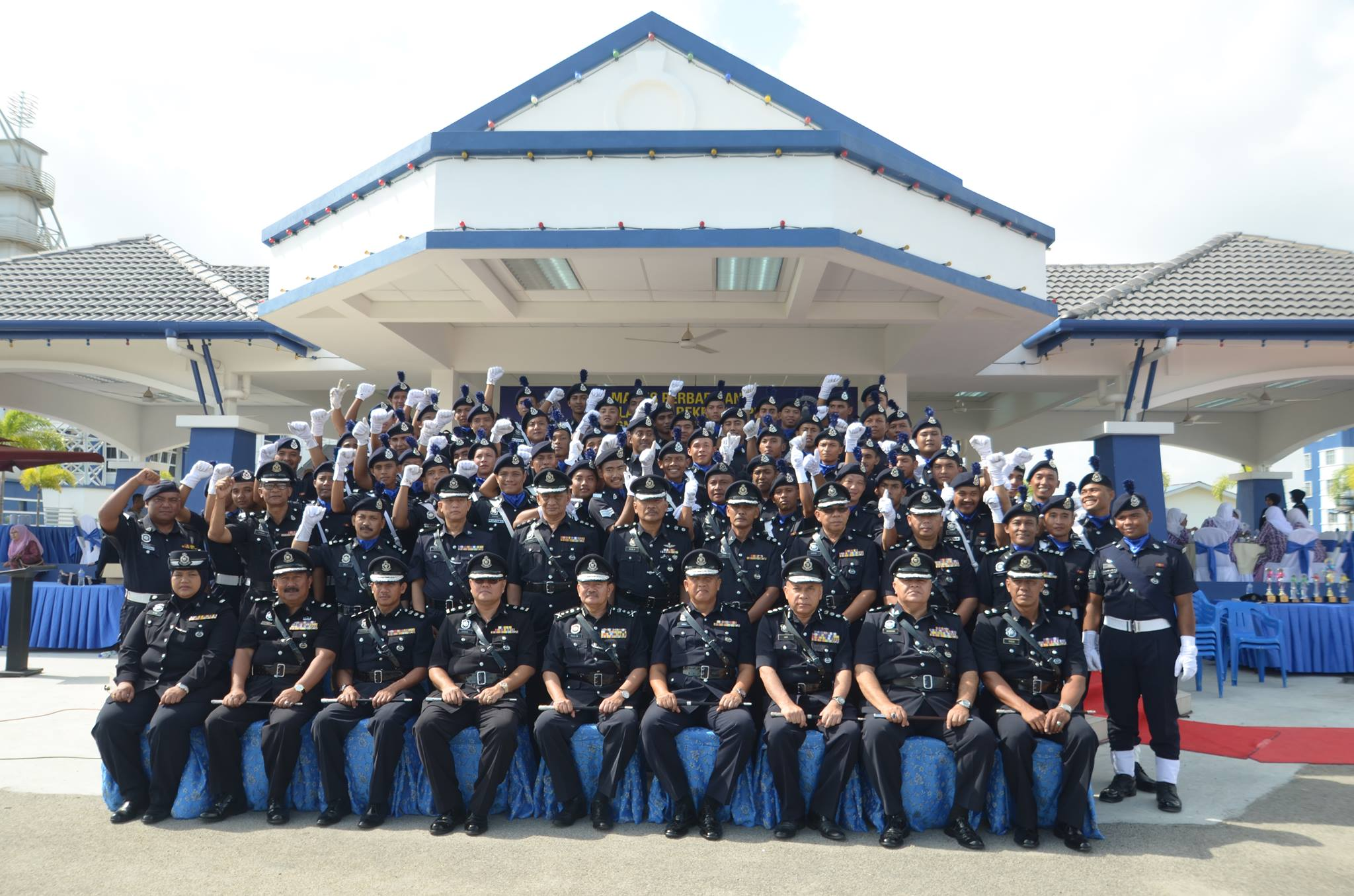 Pegawai dan sebilangan anggota SSP Kontinjen Kelantan bergambar bersama Ketua Polis Kelantan selepas majlis tamat latihan asas kepolisan di IPK Kelantan